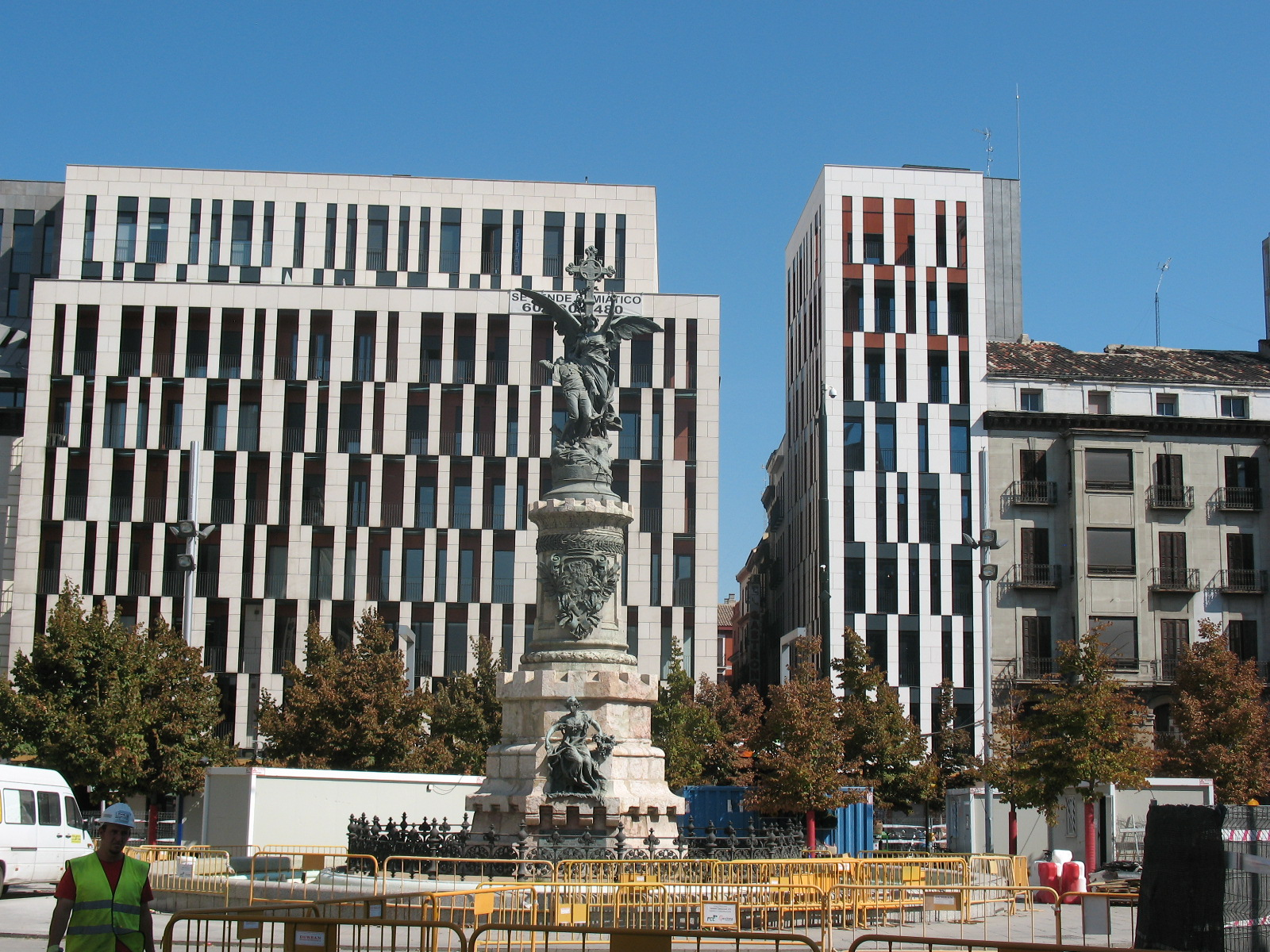 На площади «Плаза-Эспанья»